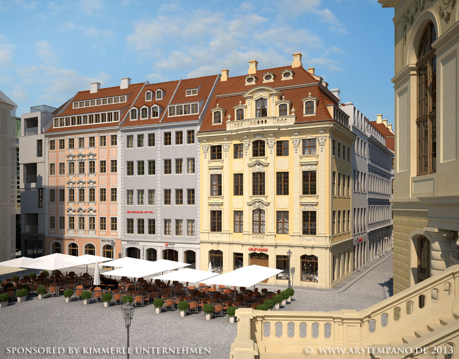 Die Westseite des Jüdenhofs (Quartier VII.2) nach dem Wiederaufbau (Visualisierung)